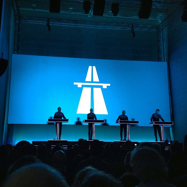 #kraftwerk #autobahn via Instagram instagr.am/p/UWuSQzgrEl/